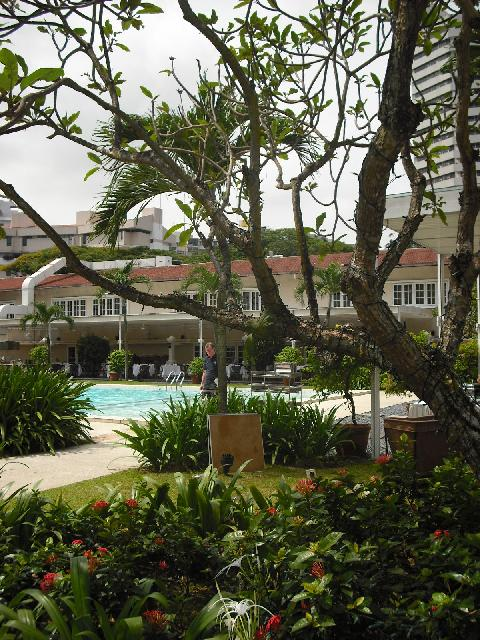 Goodwood Park Hotel Pool Area